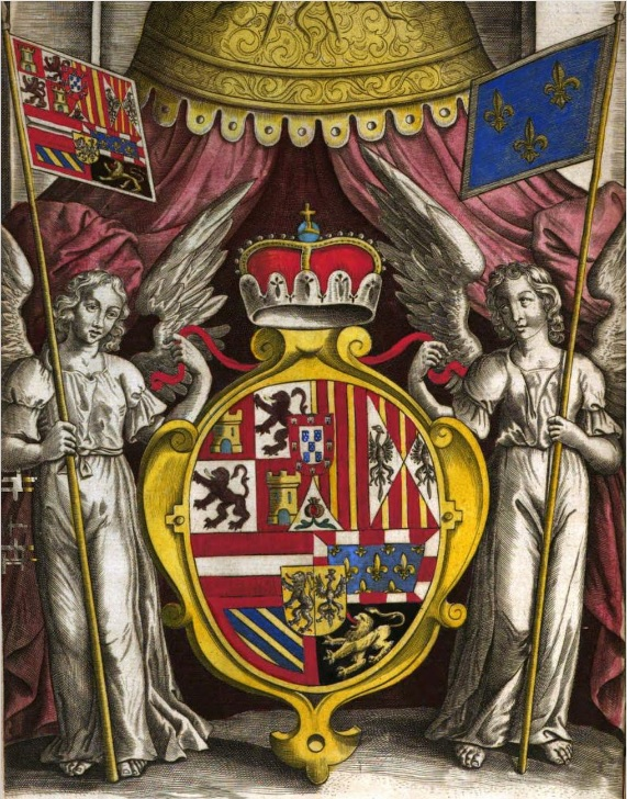 Recherche des antiquitez et noblesse de Flandres/ Clara Eugenia